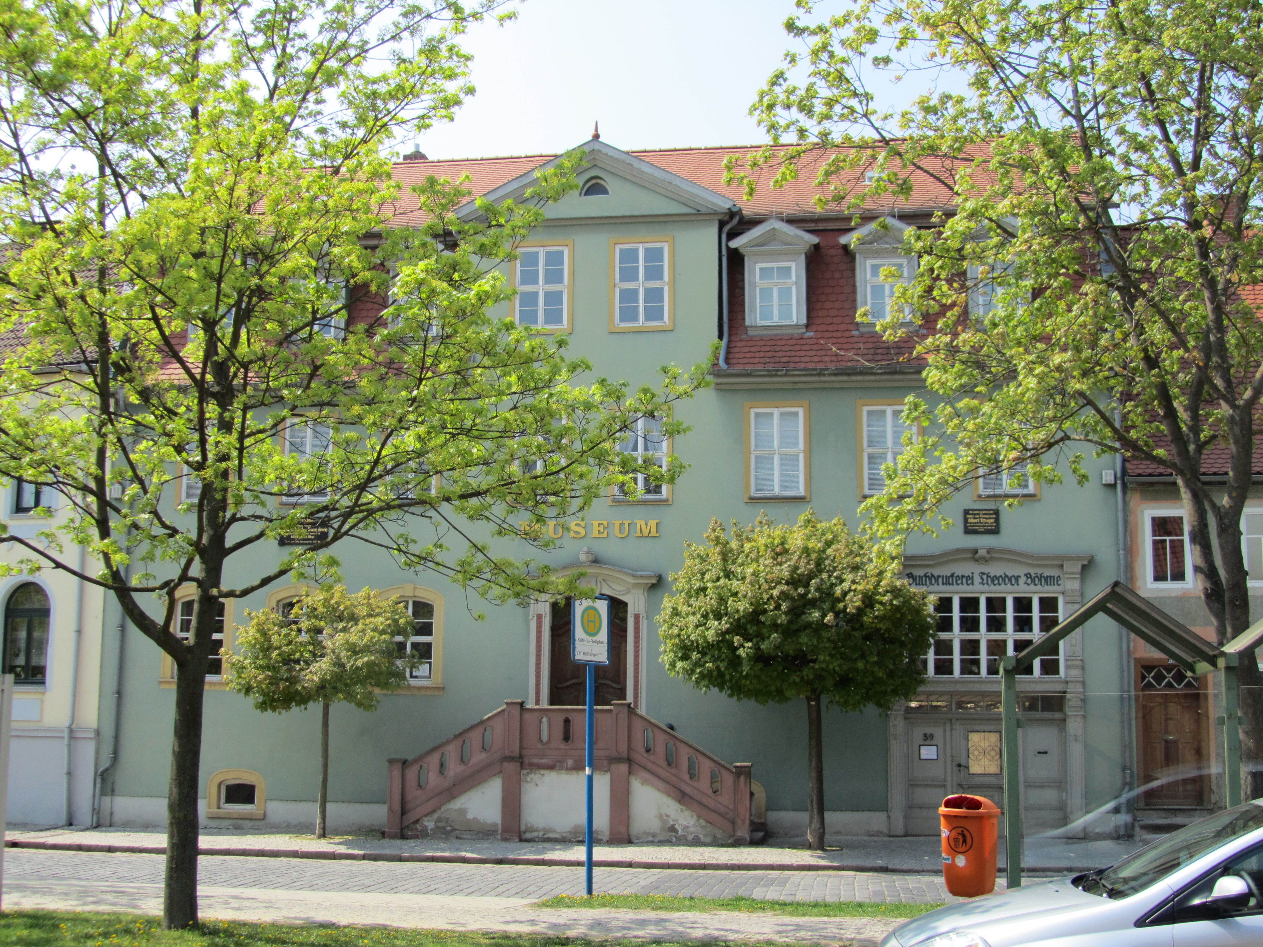 Das Stadtmuseum in Kölleda (Thüringen).